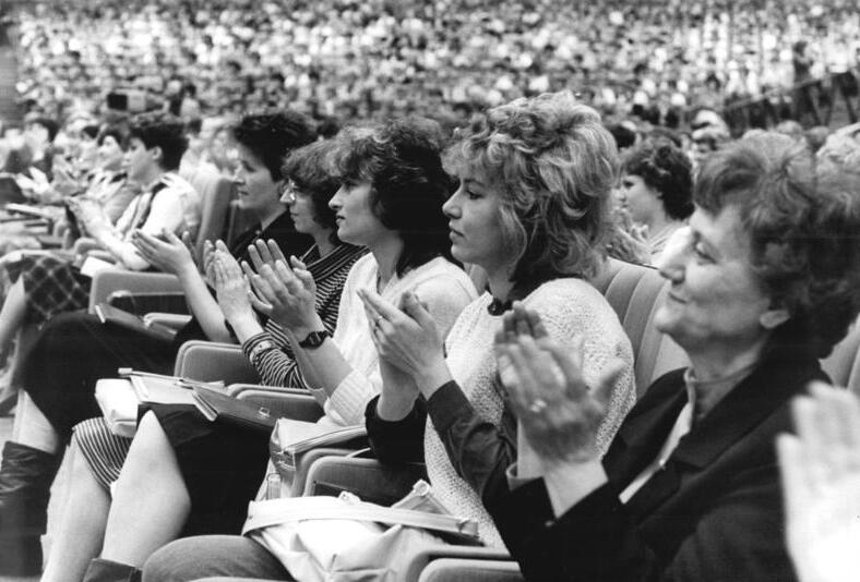 ADN-ZB Mittelstädt-5.3.87-kb- Berlin: XII. DFD-Kongreß- Der Bundeskongreß des DFD nahm im Palast der Republik seine zweitägigen Beratungen auf. Zu den Delegierten aus Berlin gehören Manuela Berger (2.v.r.) und Sylvia Behrendt (3.v.r.).